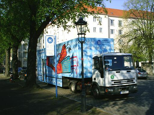 Fahrbibliothek der Stadtbibliothek Dresden